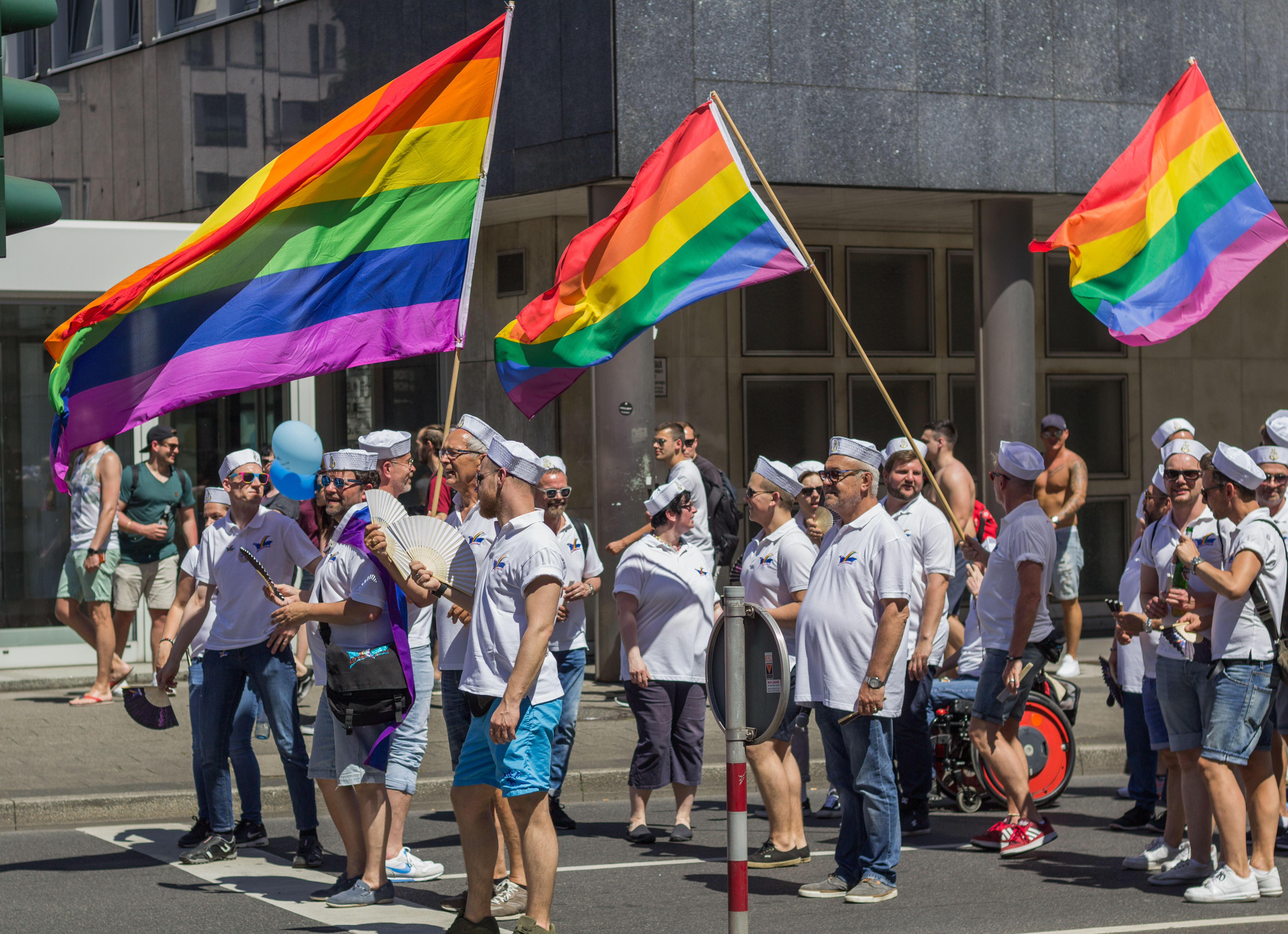 Christopher Street Day 2017 in Düsseldorf